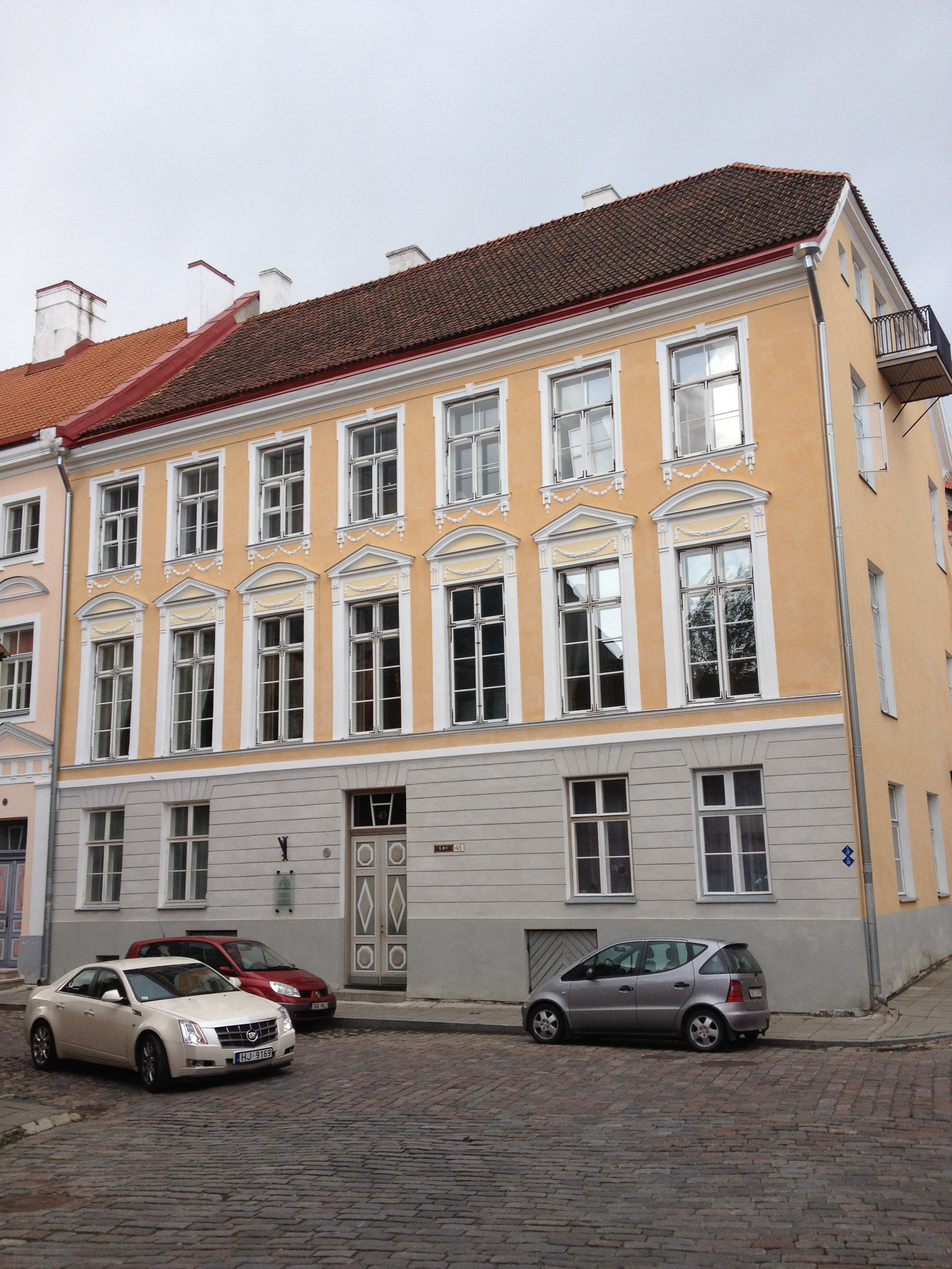 Elamu hooviansambliga Lai tn45, 15.-18.saj., 1924.a.